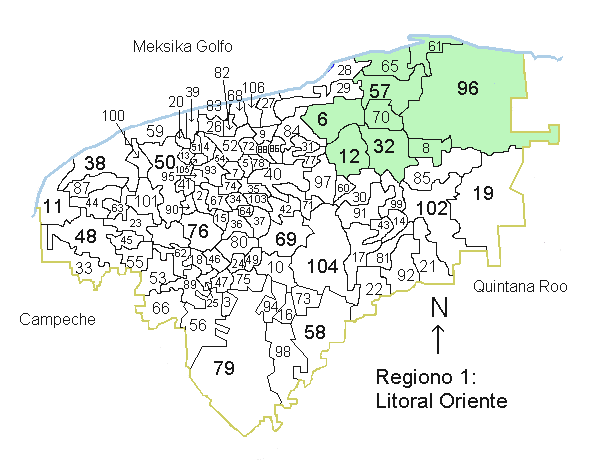 Mapo de la Regiono 1, Yucatán Litoral Oriente Kategorio:Geografio de Yucatán